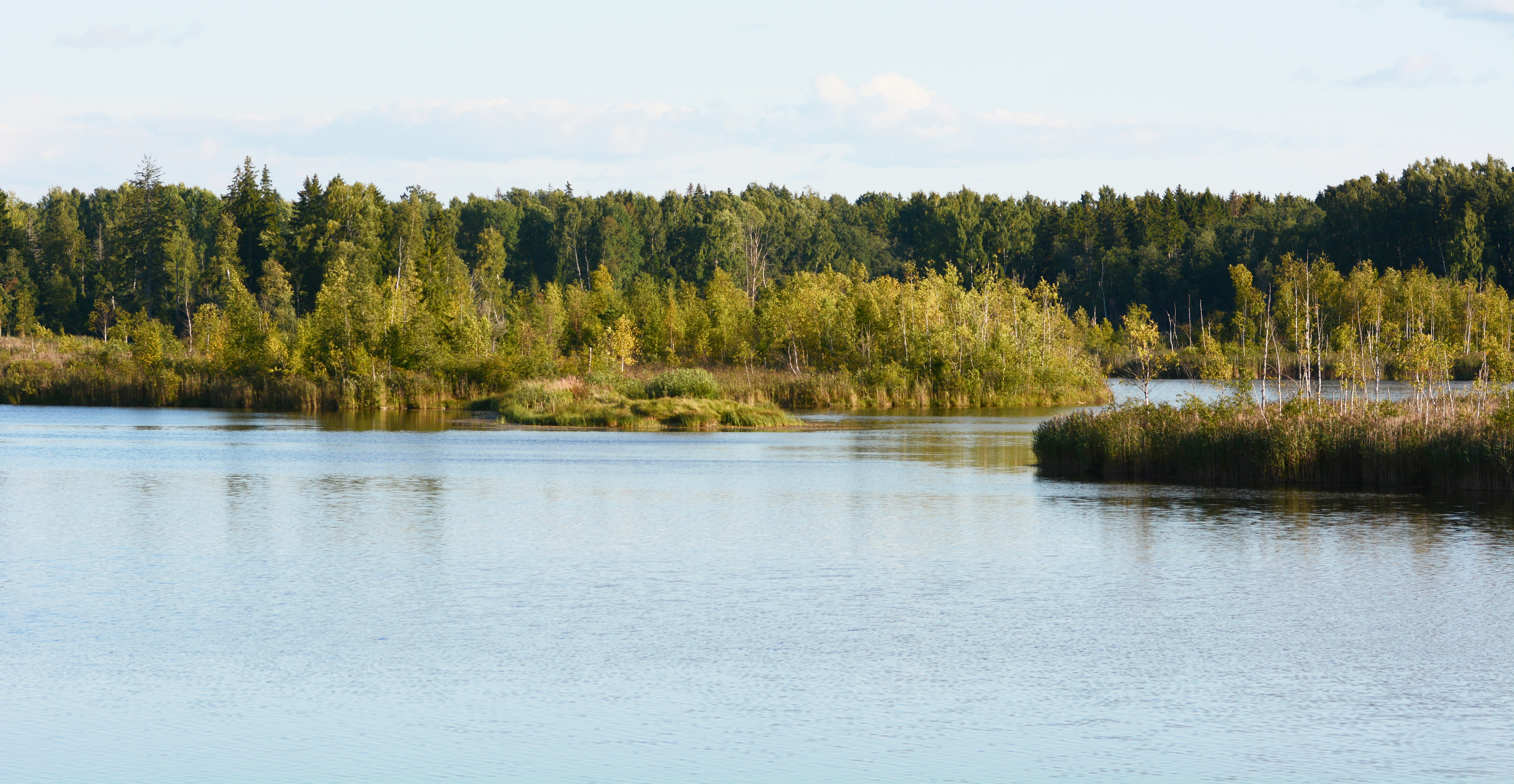 Porkuni järv (41,5 ha)on allikatoiteline ja koosneb omavahel ülevooludega ühendatud neljast järvest (Suurjärv, Aiajärv, Iiri järv ja Karujärv)